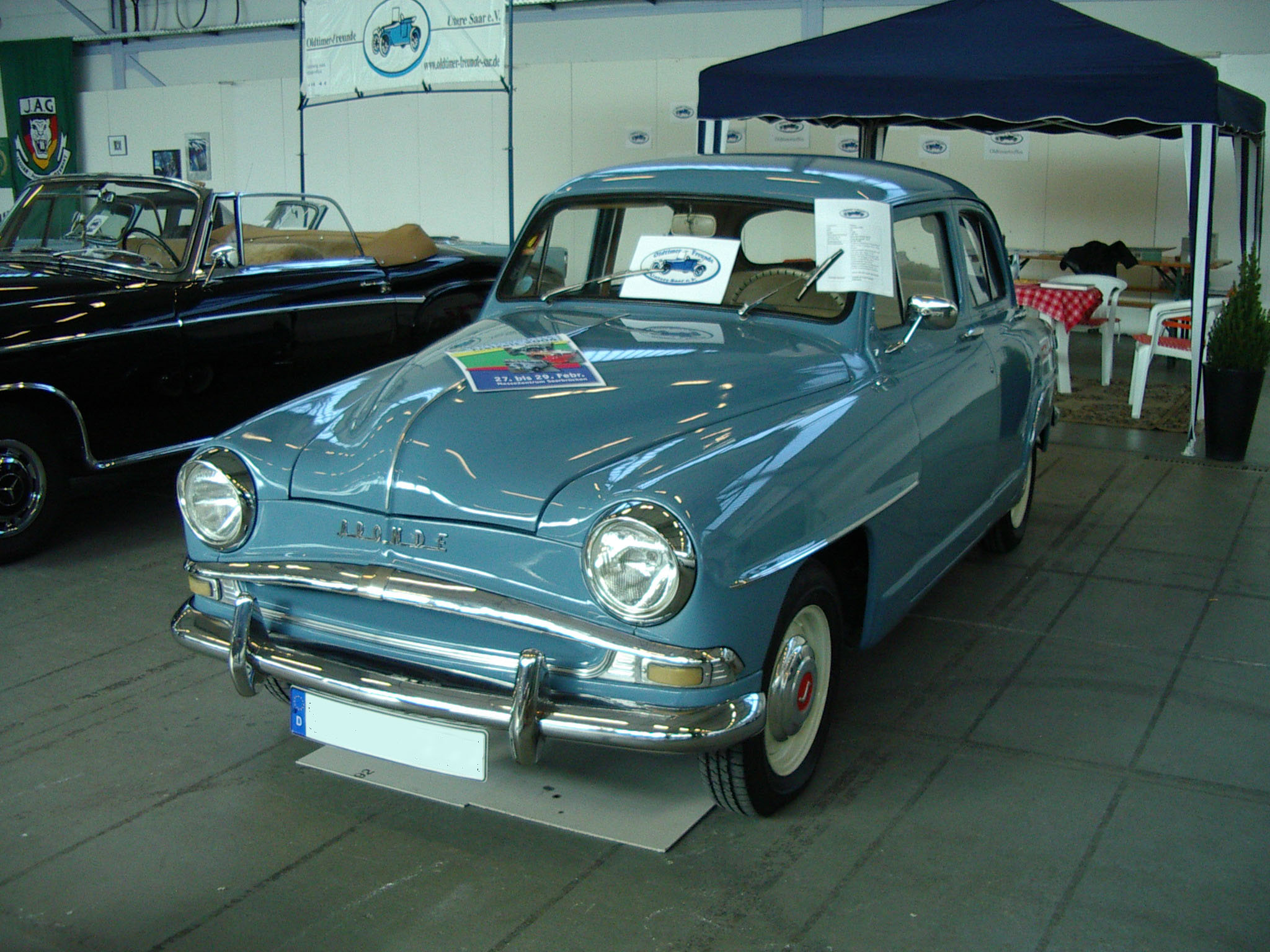 Simca Aronde Elysée